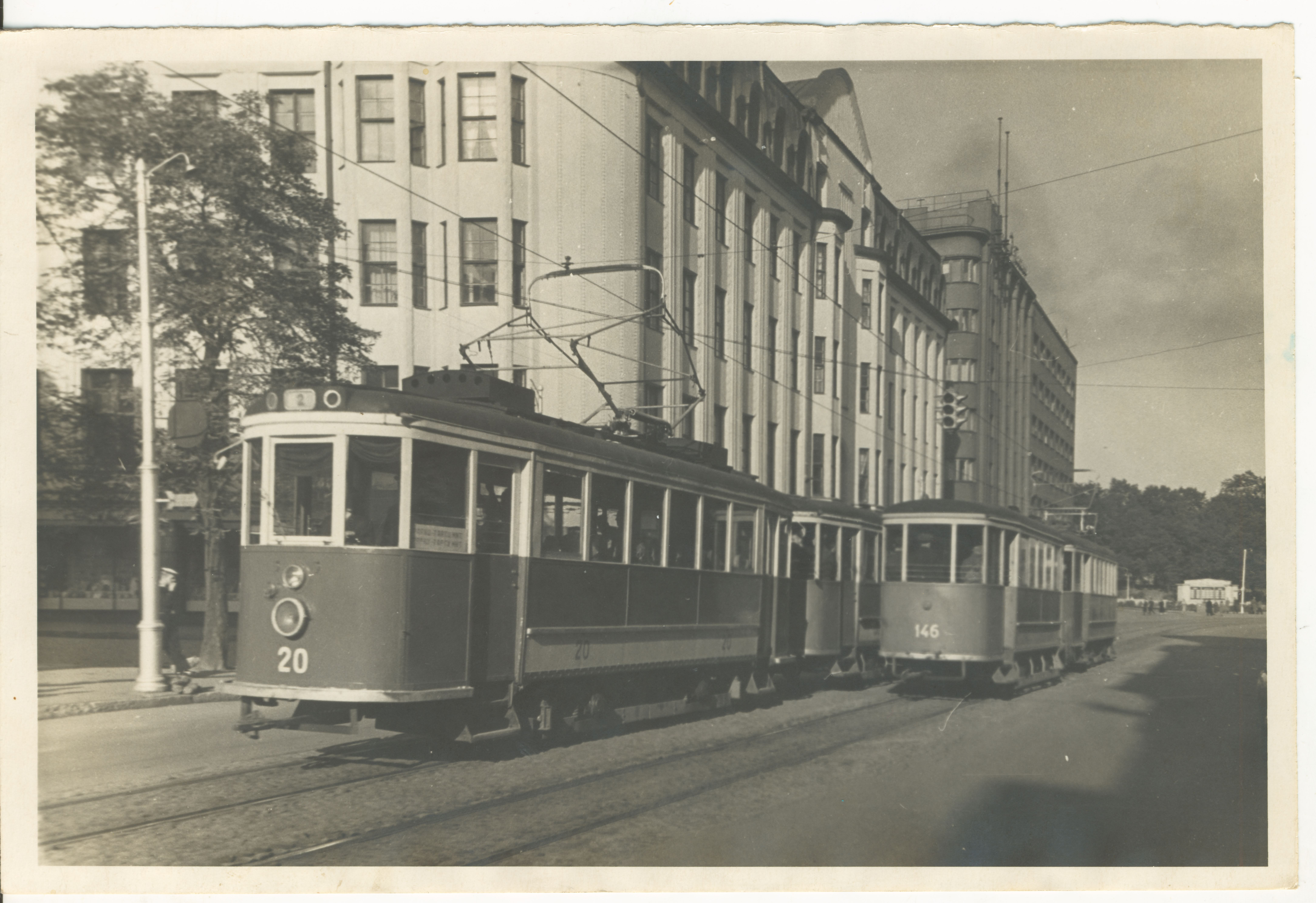 Trammid Pärnu maantee ja Suur-Karja tänava nurga